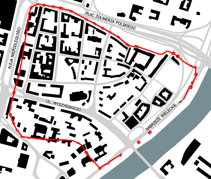 mury średniowieczne Szczecina- PIN- Płotkowiak